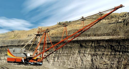 20-кубовый драглайн на угольном разрезе в Кузбассе